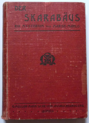 Der Skarabäus, Dt. Erstausgabe 1900, Verlag Müller-Mann, Leipzig